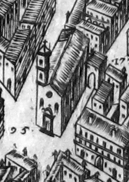 Pianta del buonsignori, dettaglio 095 santa maria maggiore